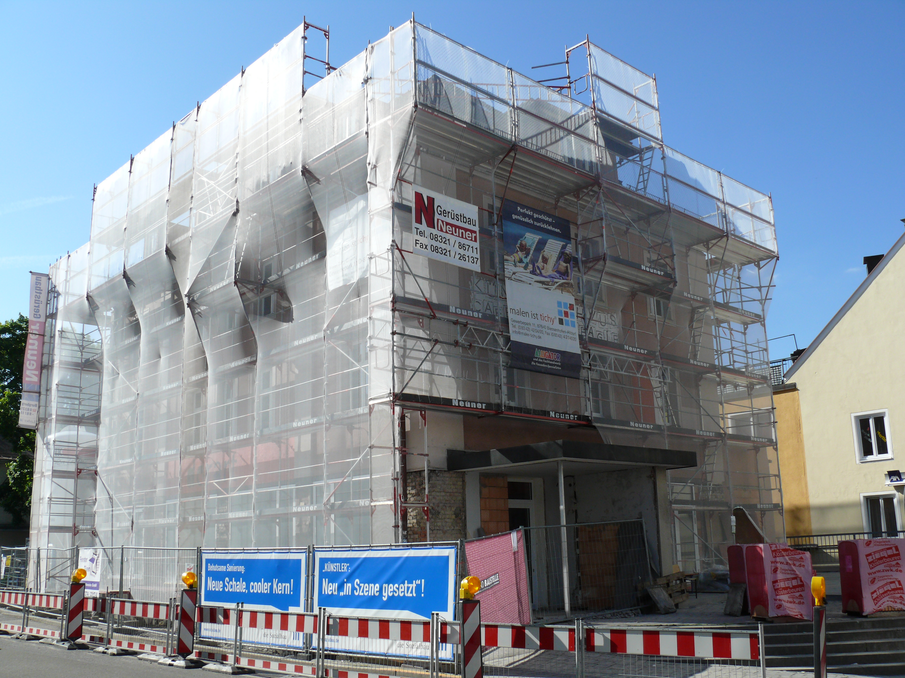 Ansicht des Künstlerhauses während des Umbaus im Juni 2013